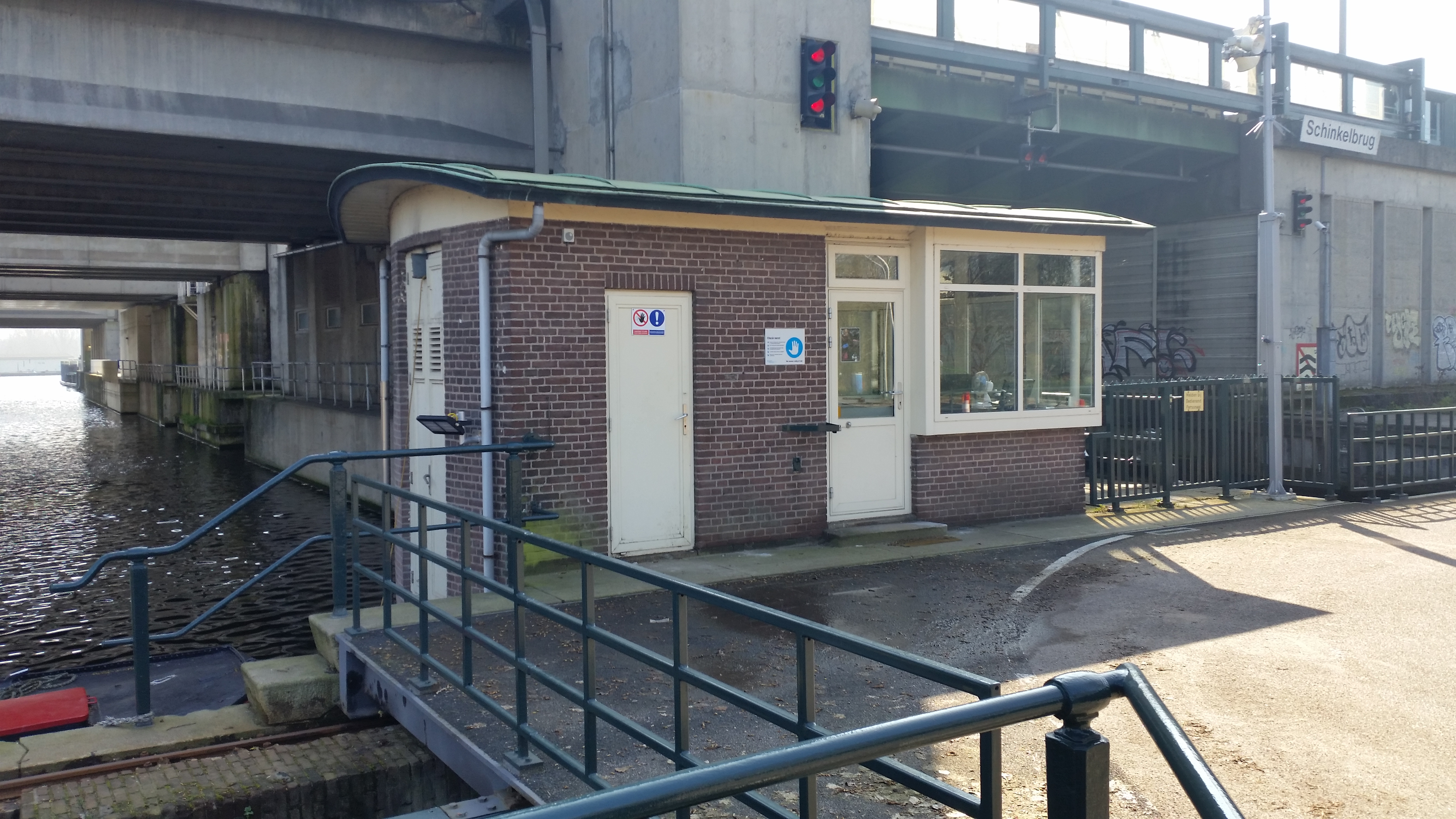 Nieuwe Meersluis